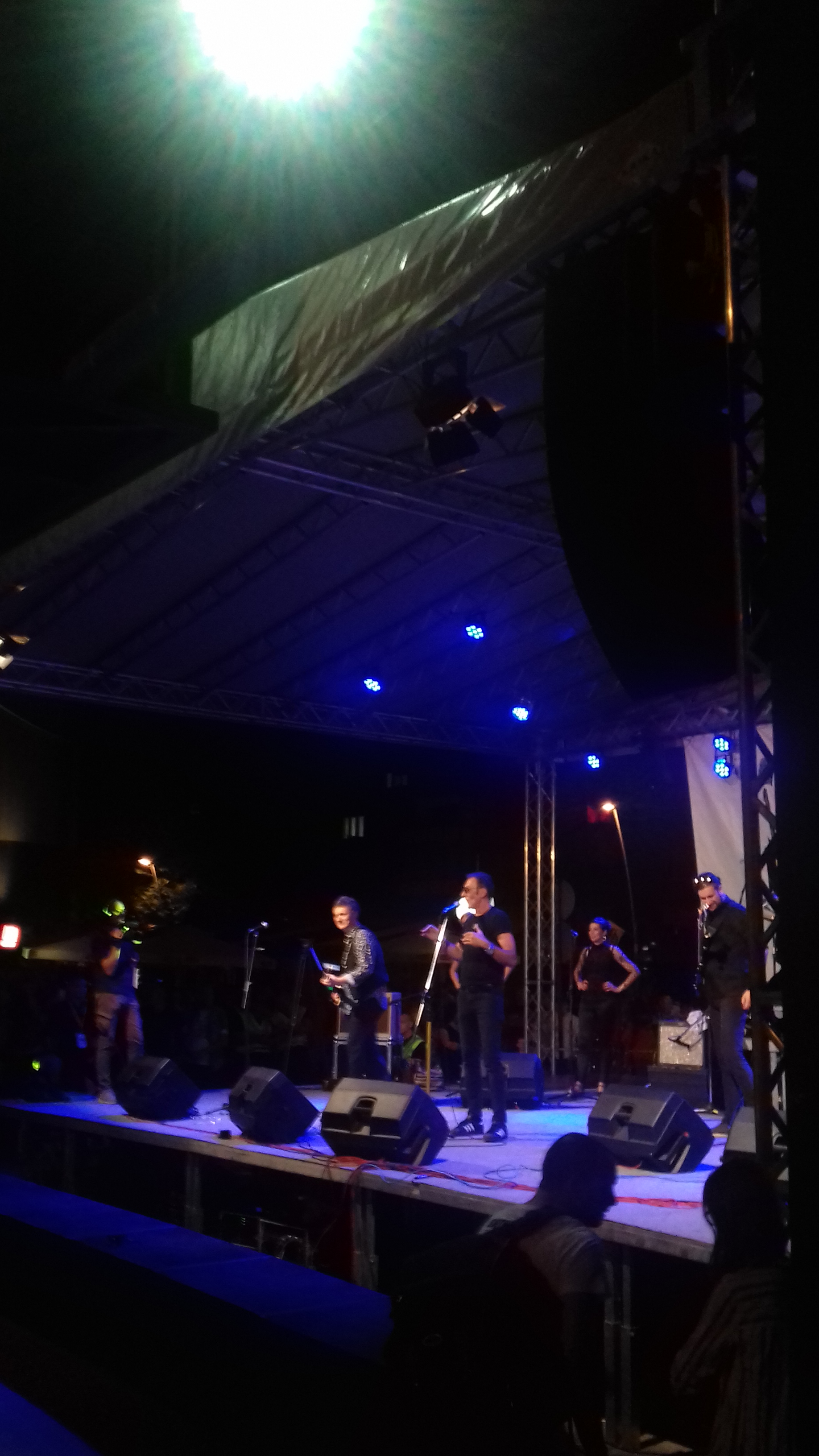 Наступ Бомбај штампе на Зеница самер фесту, други главни концерт фестивала